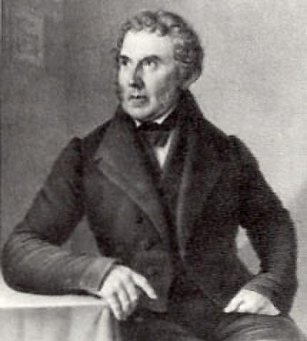 Friedrich Pogge Datum: um 1830 Urheber: (mir unbekannter) Portraitmaler Quelle: Zieladresse des Bildes